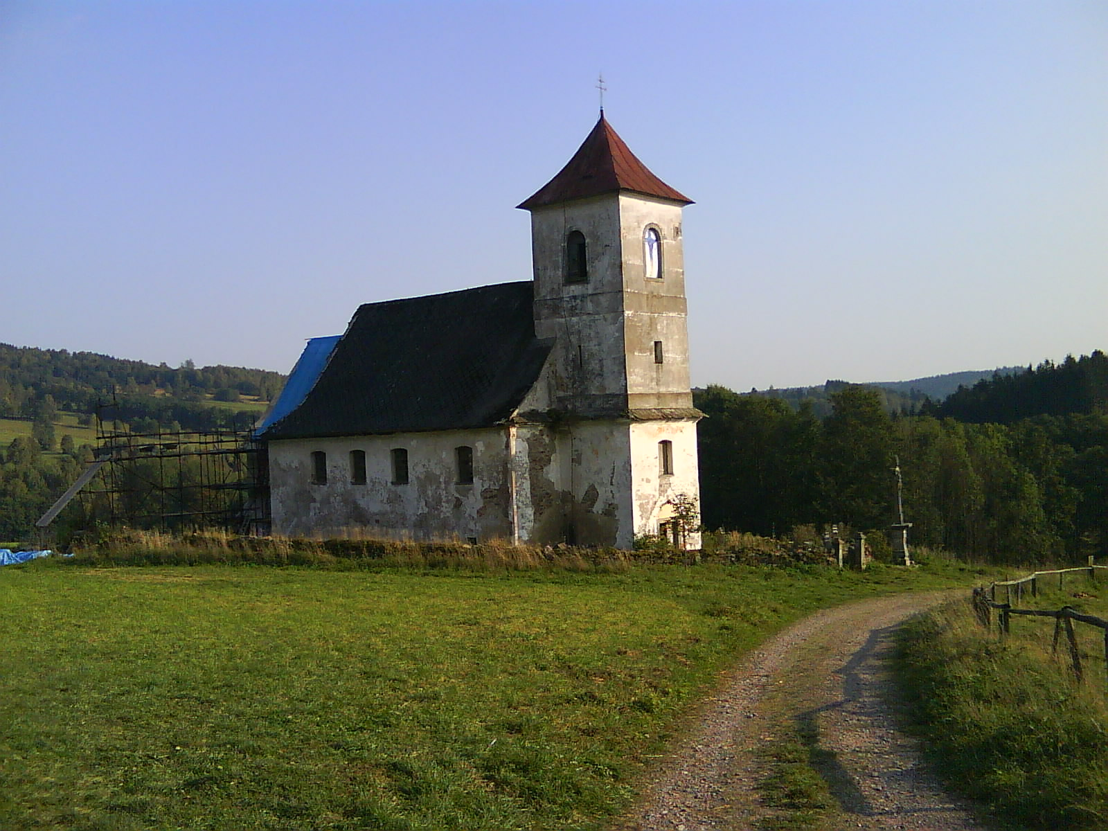 Vrchní Orlice - kostel sv. Jana Nepomuckého